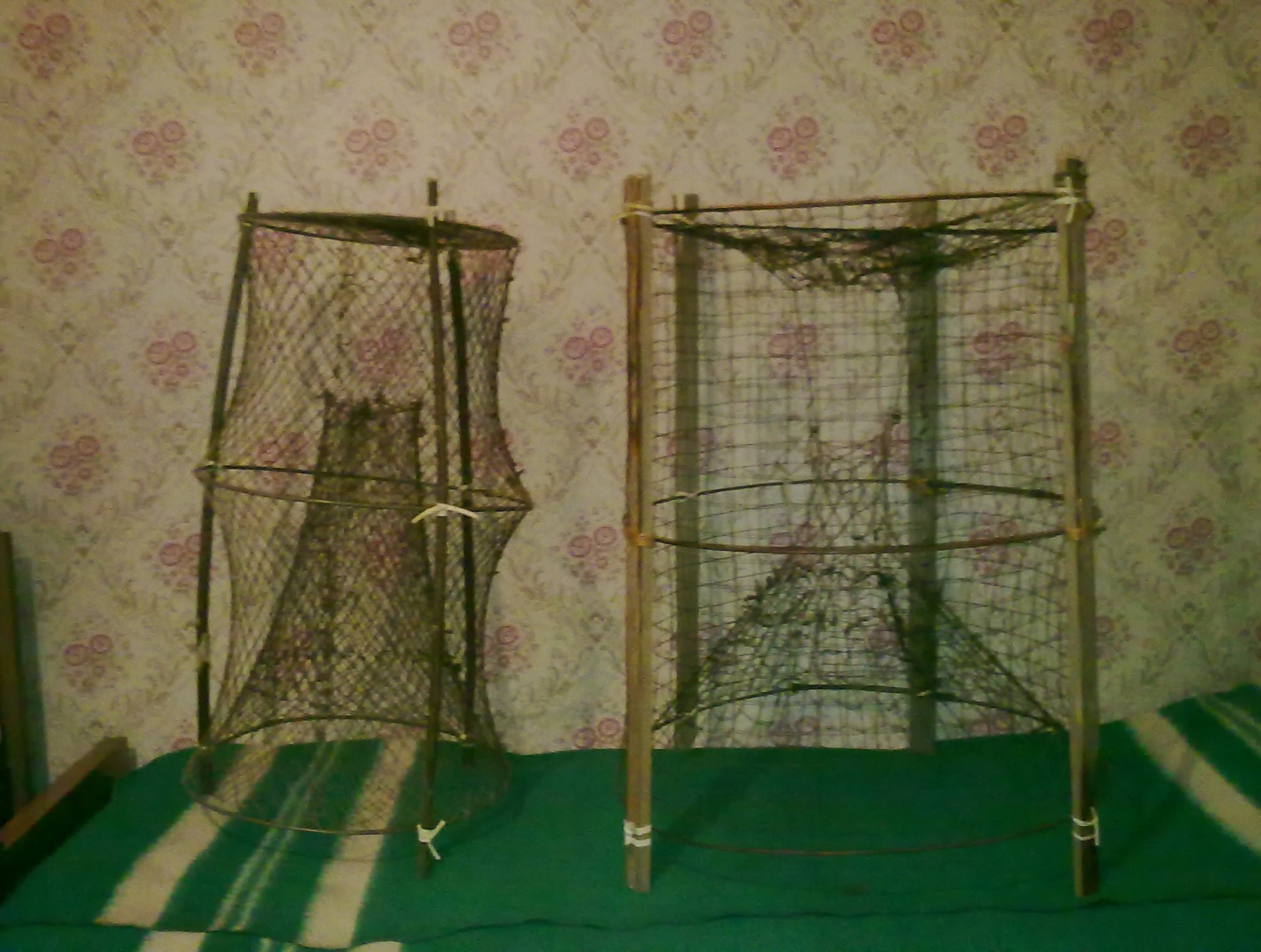 Ятір з лози